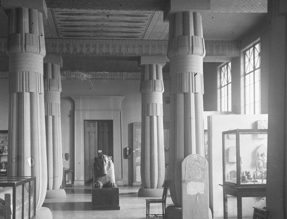 Зал искусства и культуры Древнего Египта. Музей изящных искусств имени императора Александра III.